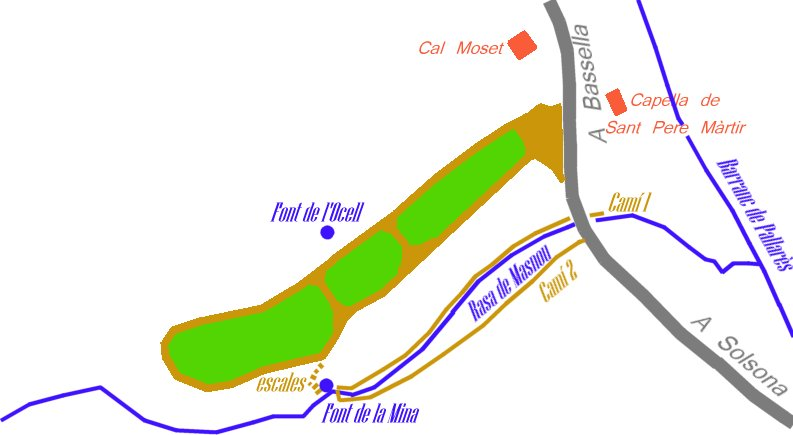 Plànol de l'entorn de la font de la Mina, a Solsona (Solsonès).